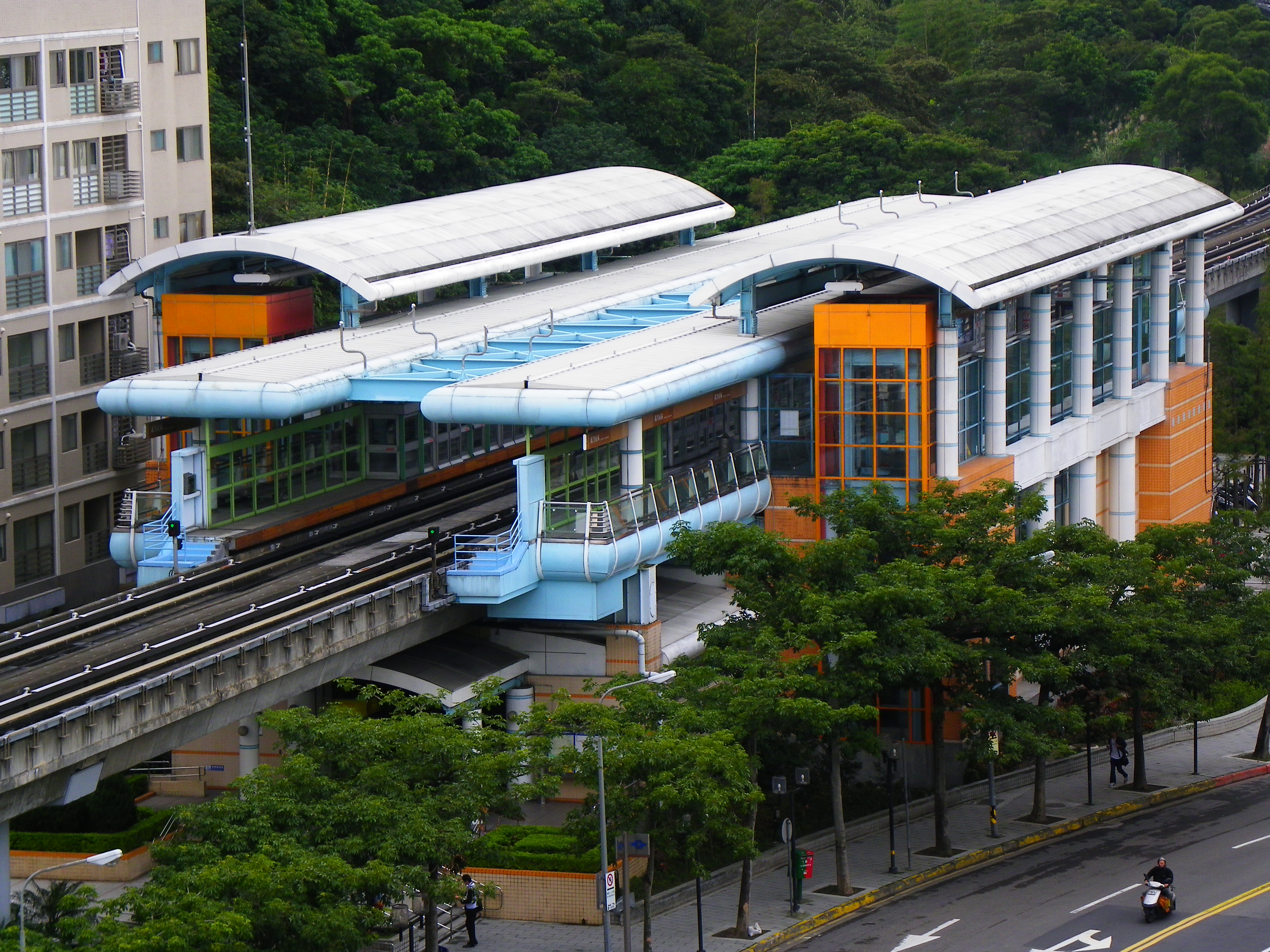 台北捷運文山線萬芳社区駅俯瞰。